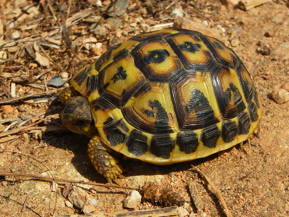 Junge Griechische Landschildkröte (Testudo hermanni boettgeri) auf Menorca